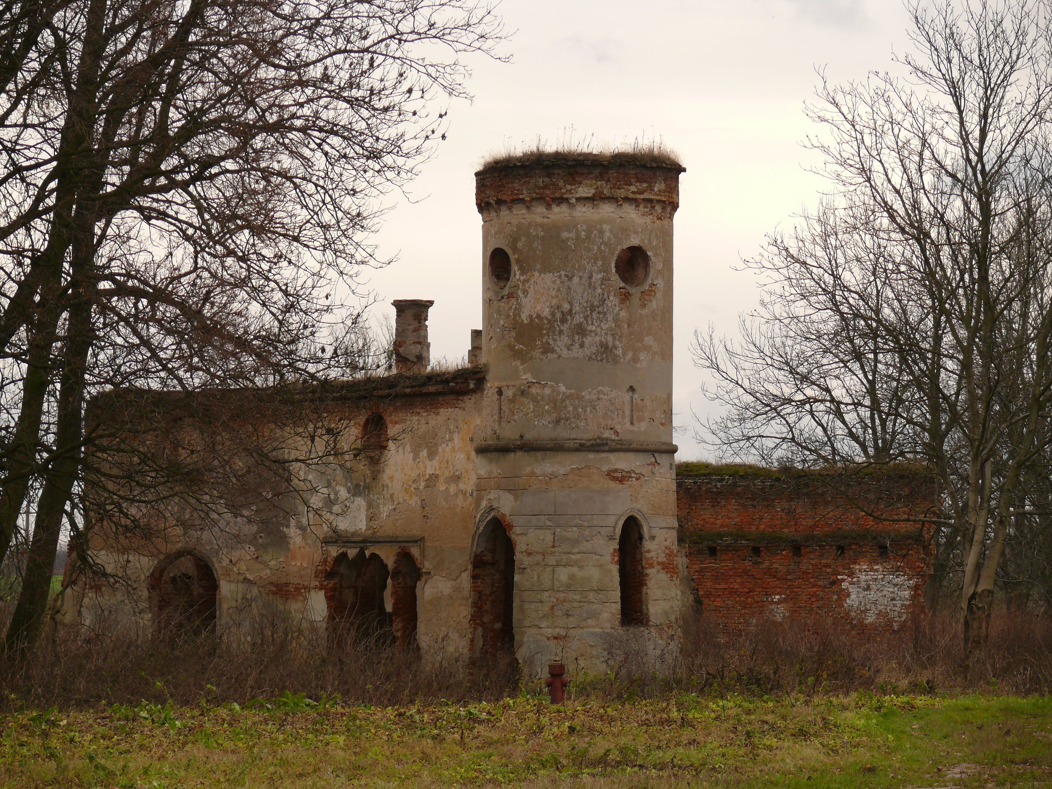 Ruiny stajni i wozowni w zespole pałacowo-parkowym rodziny Rastawieckich w Dołhobyczowie. Wpisane do rejestru zabytków pod nr A/260 z 30.09.1959 i z 28.02.1967